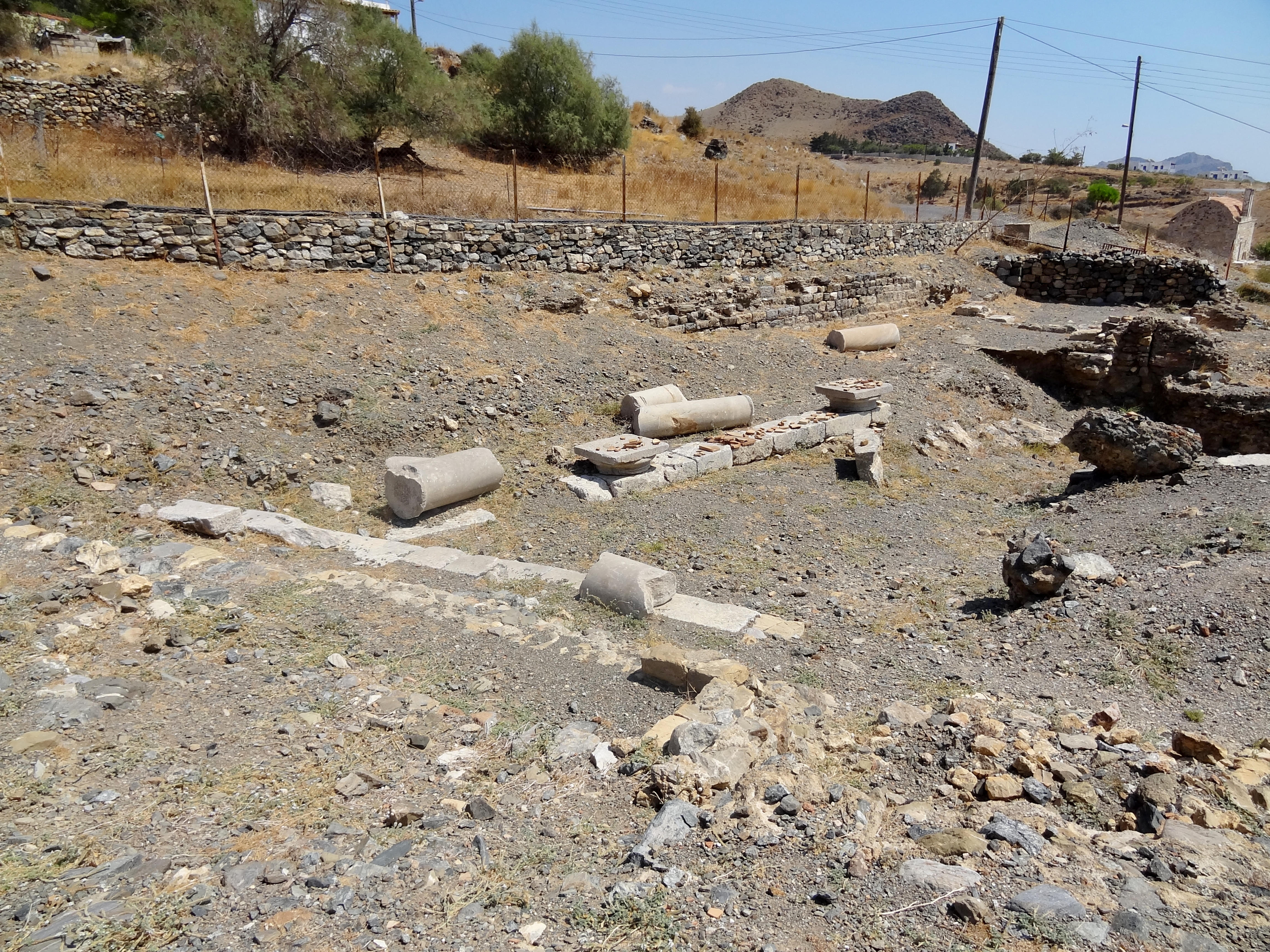 Reste des antiken Leben (Λεβήν) in Lendas, Gemeinde Gortyna, Regionalbezirk Iraklio, Kreta, Griechenland